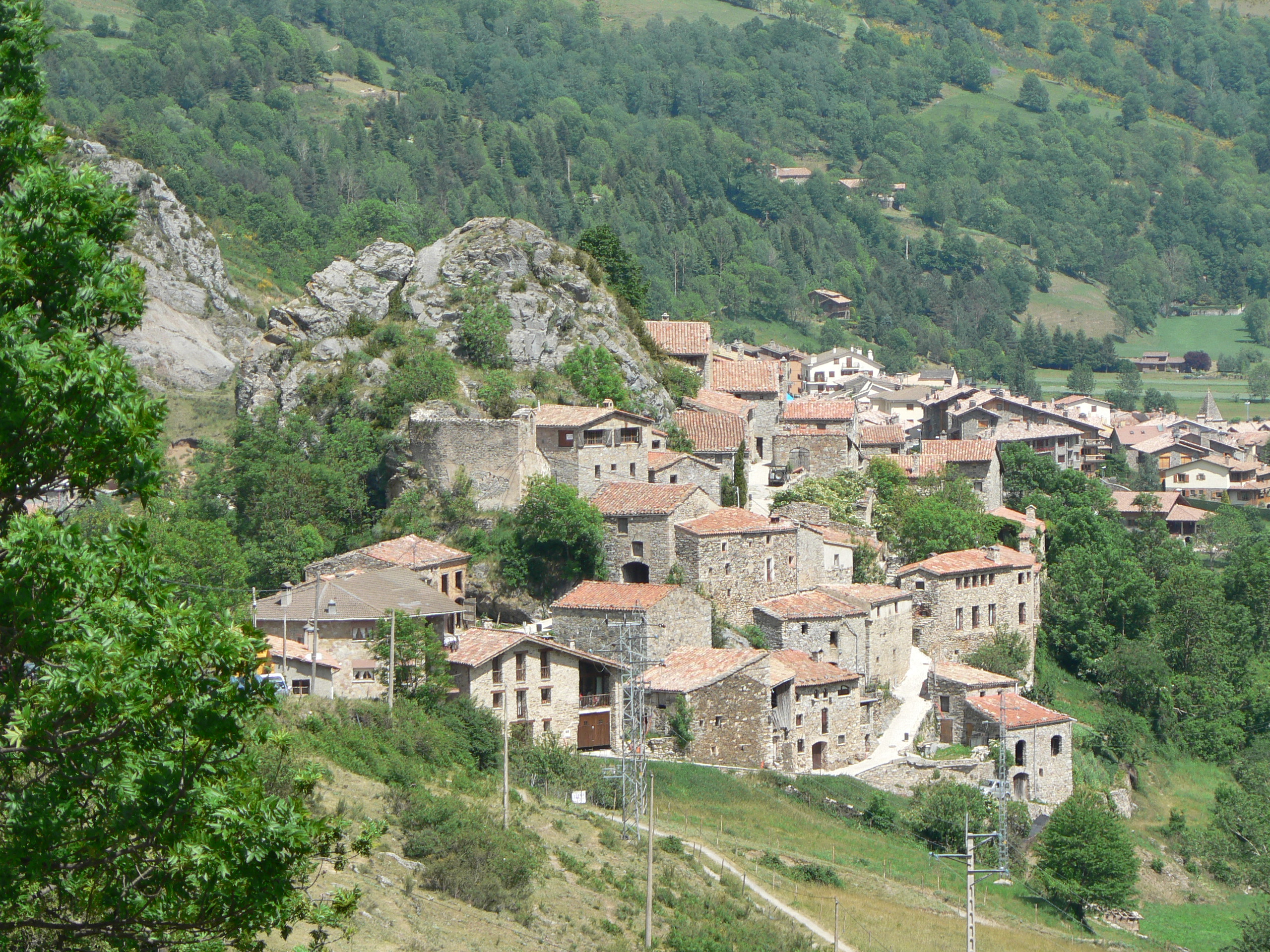 La Roca, nucli de Vilallonga de Ter